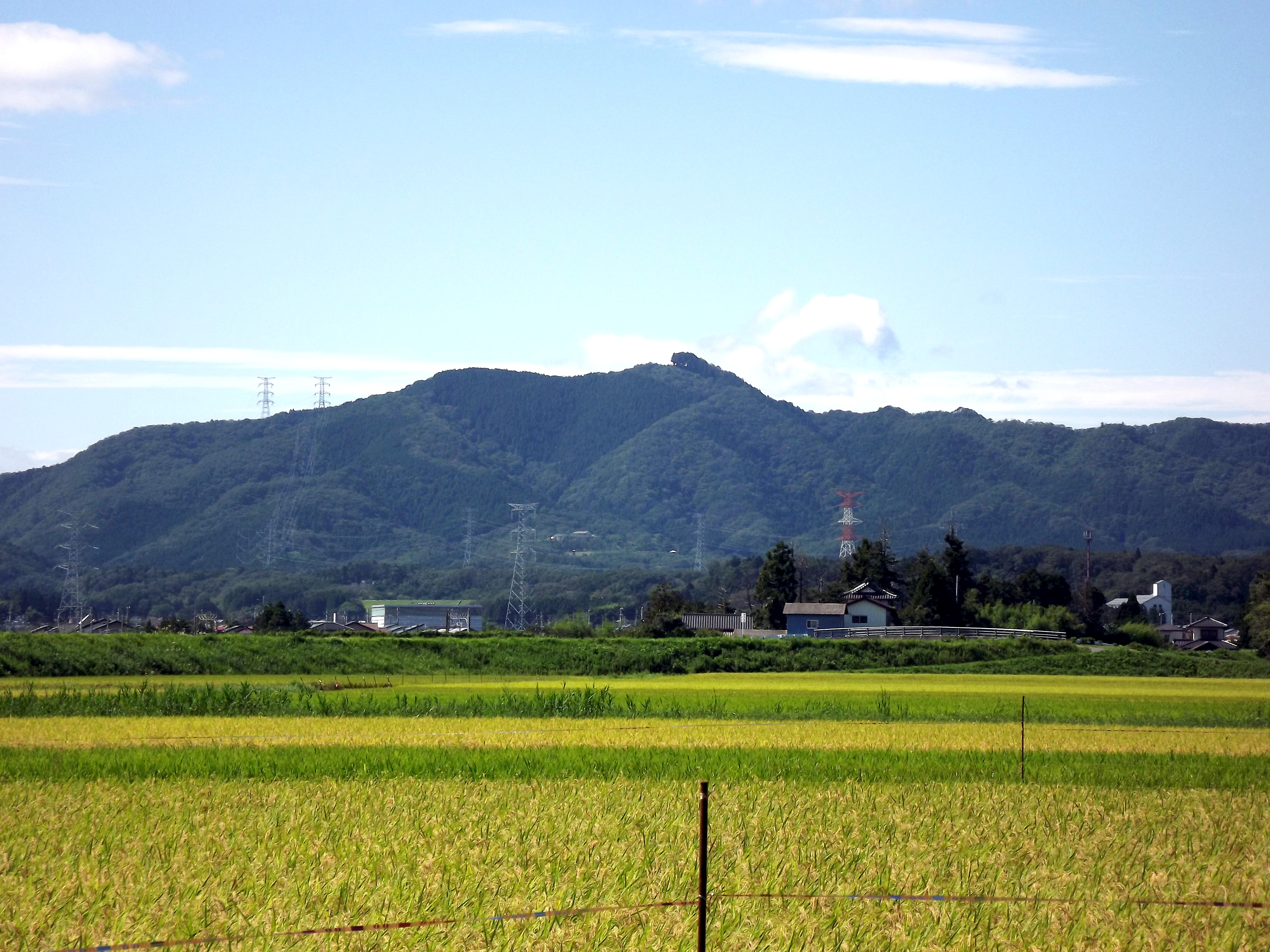 鹿狼山（福島県相馬郡新地町）